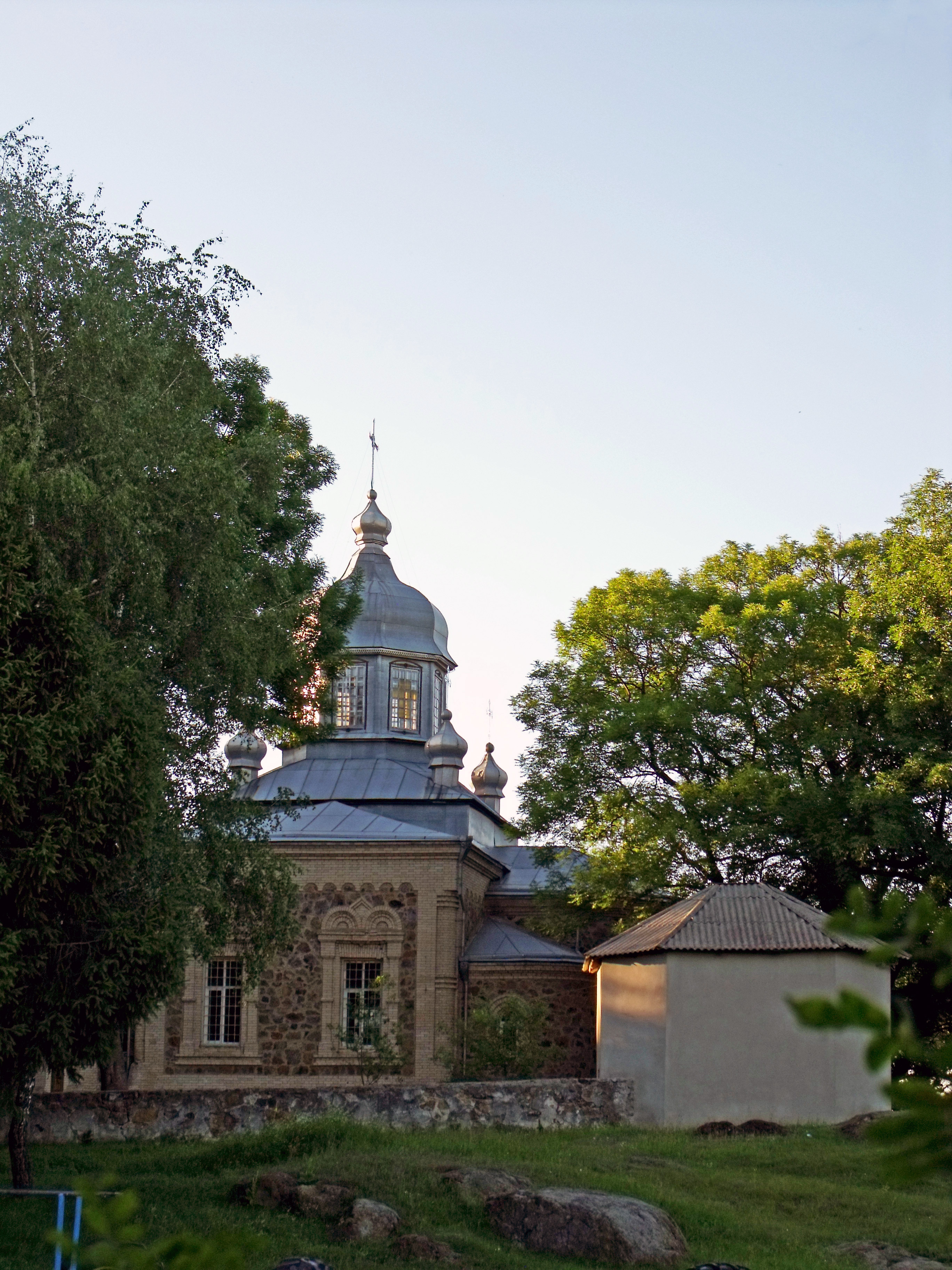 Церква Успіня Пресвятої Богородиці, Гущинці, вул.Леніна,14